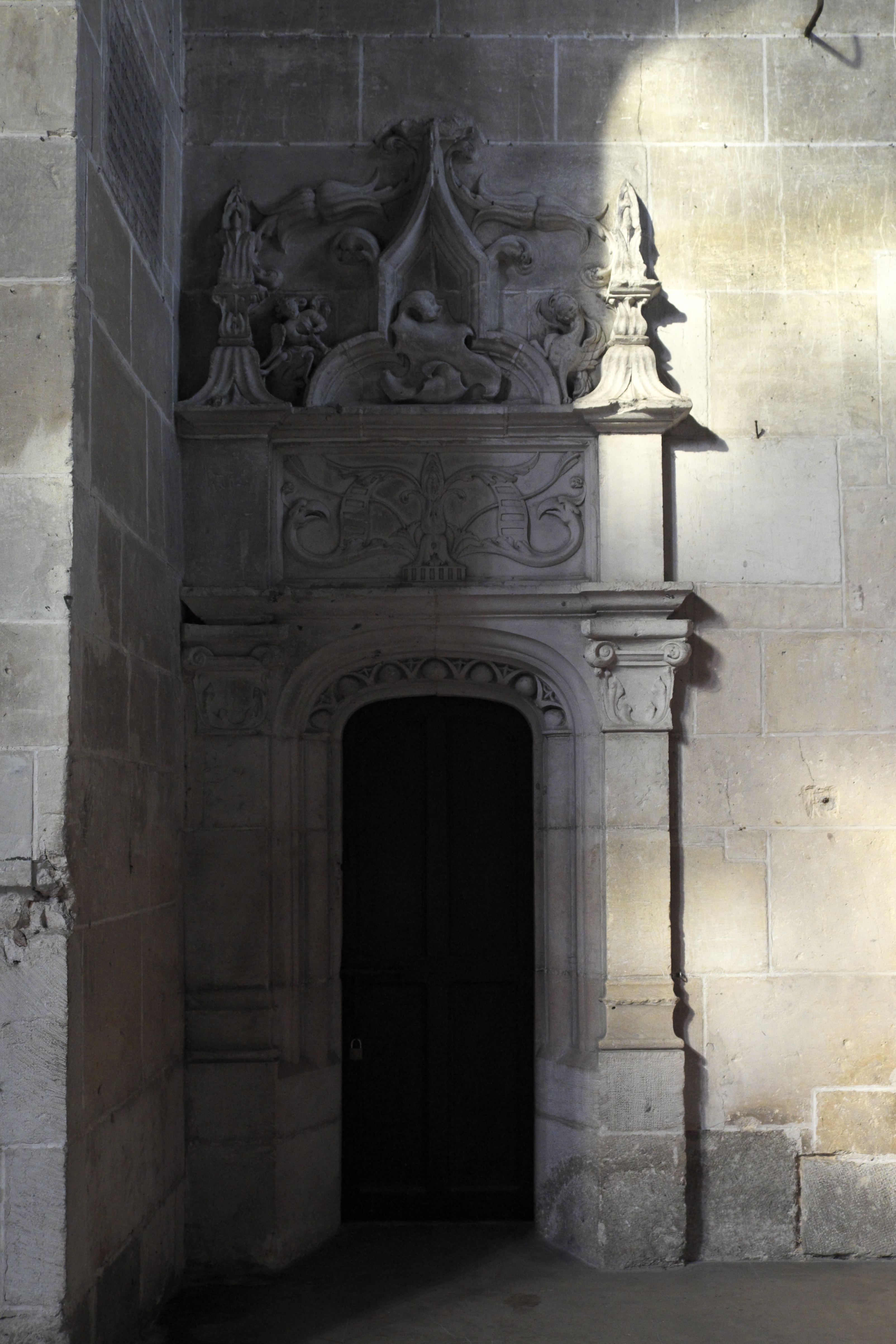 Katholische Kirche Saint-Pierre in Dreux im Département Eure-et-Loir (Centre-Val de Loire/Frankreich), Türumrahmung im Innenraum